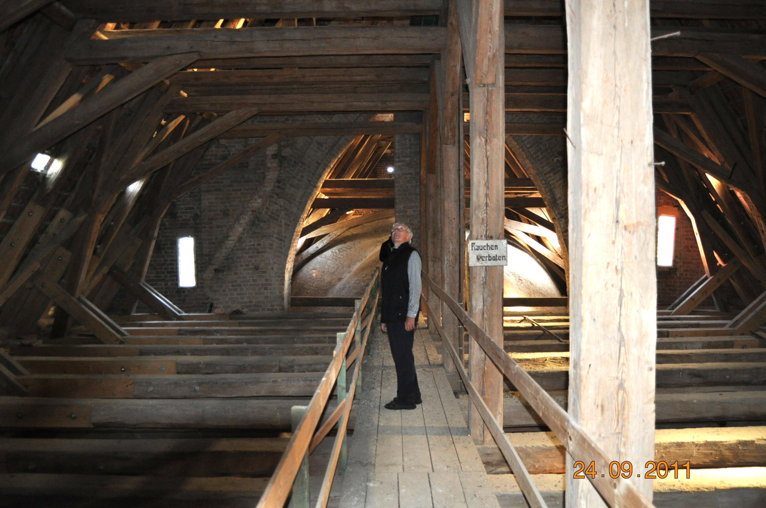 Nikolaikirche Gützkow - Balkenwerk über dem Kirchenschiff